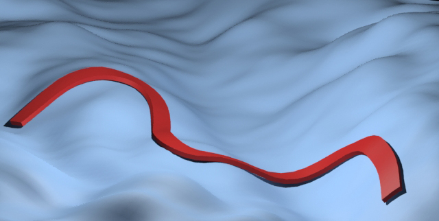 prilagajanje telesa a, telesu b